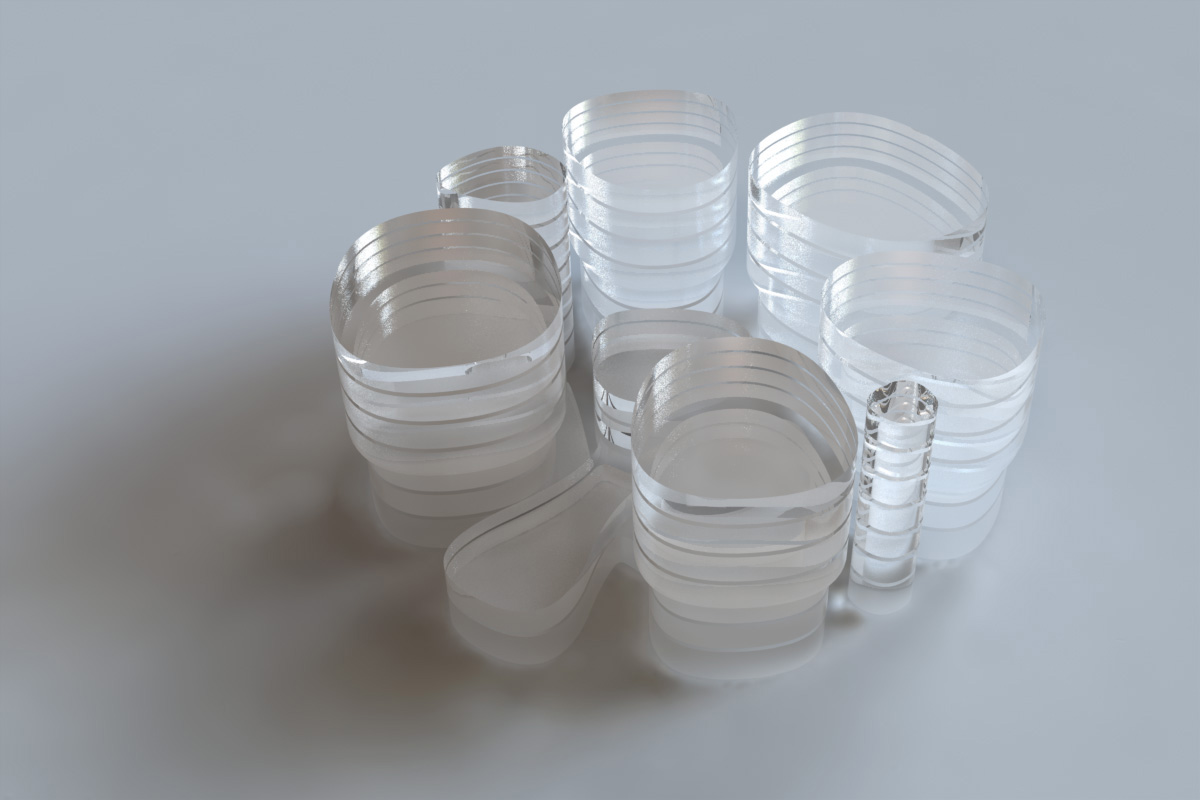 maqueta